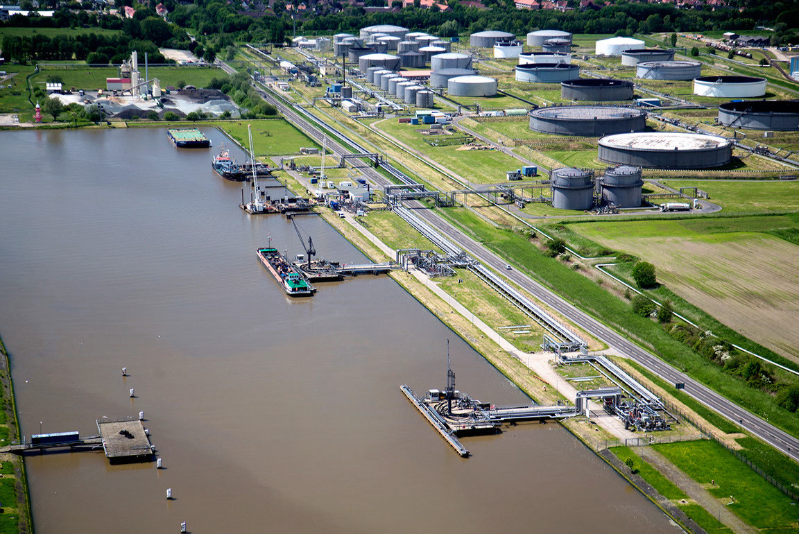 Deitsch: Ölhafen der Raffinerie Heide GmbH, Standort Brunsbüttel